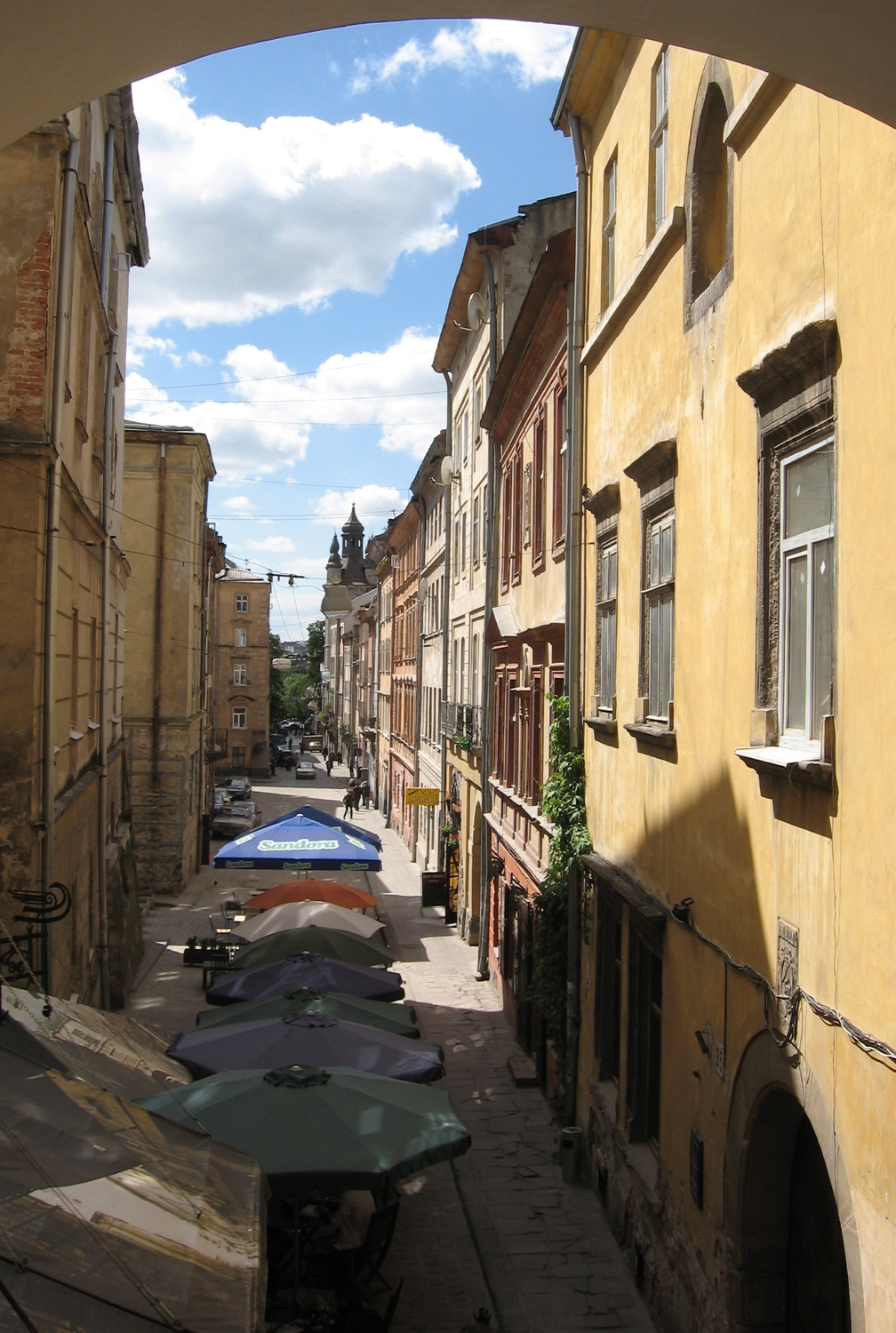 Вид на ул. Армянскую во Львове